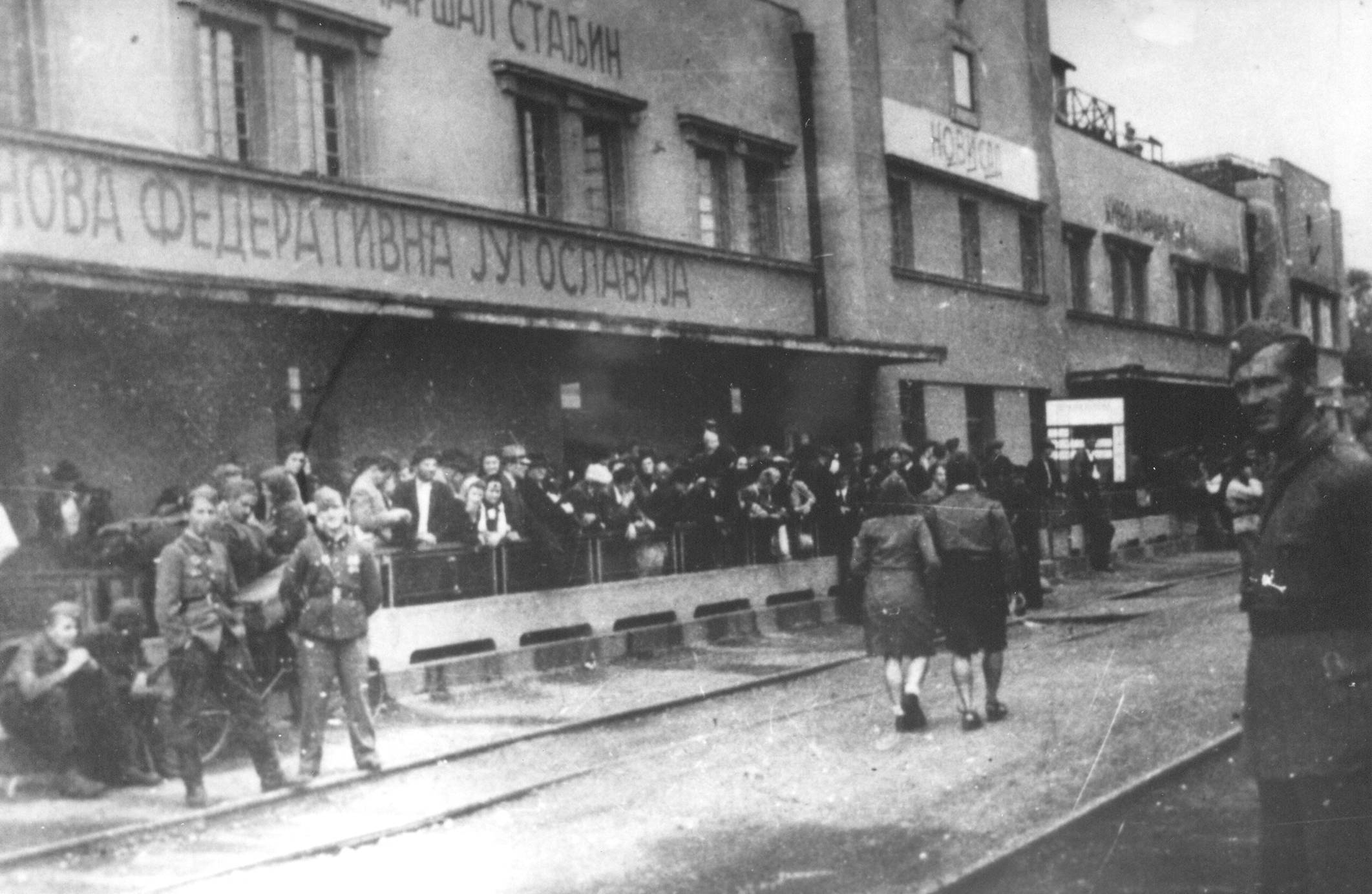 Srpskohrvatski / српскохрватски: Borci 4. vojvođanske brigade na železničkoj stanici u Novom Sadu 1944.